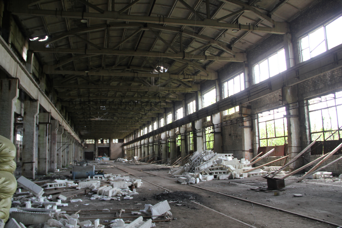 Авдеевка, промзона.